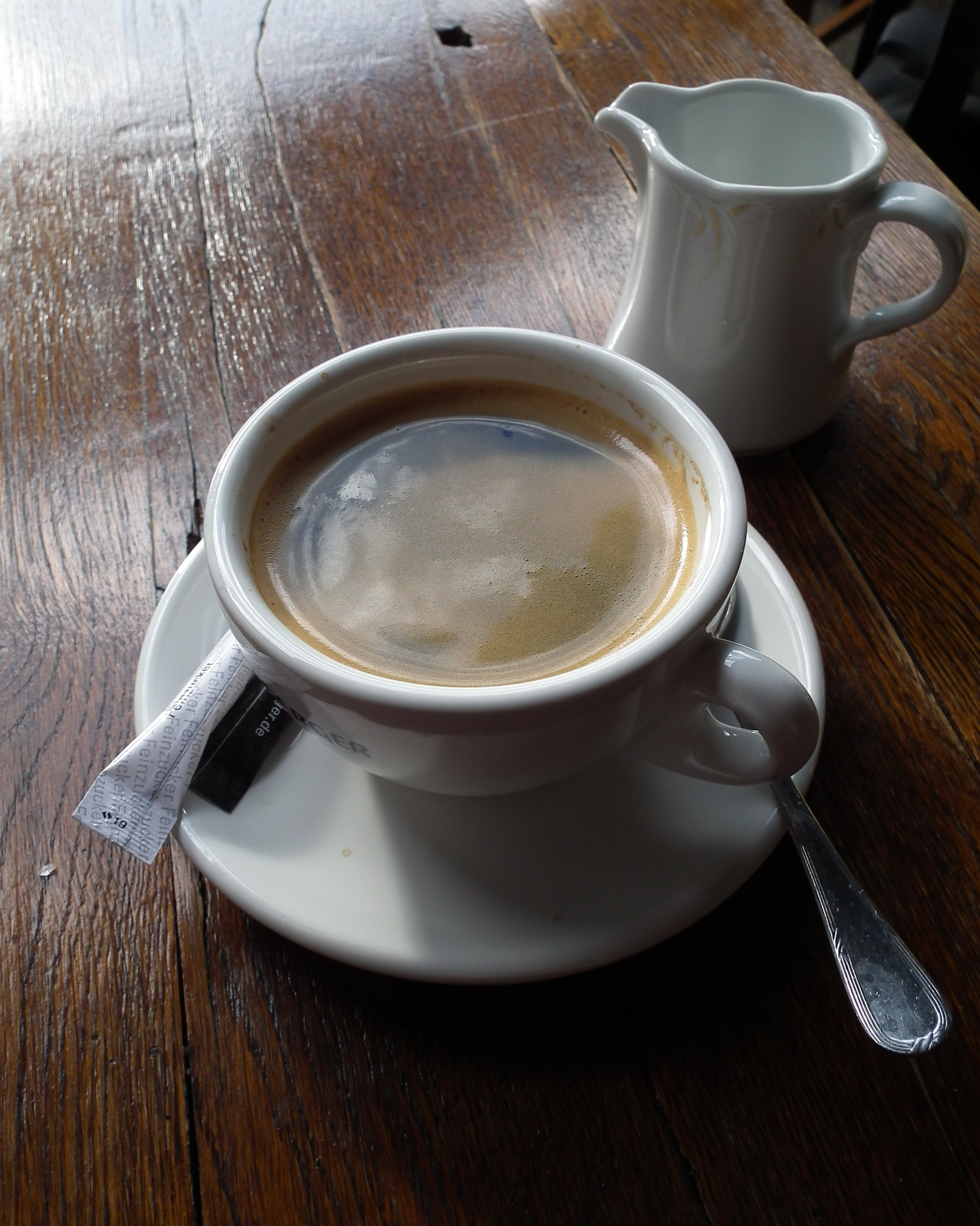 Tasse Kaffee mit einem Kännchen Milch und Zucker in Portionssticks